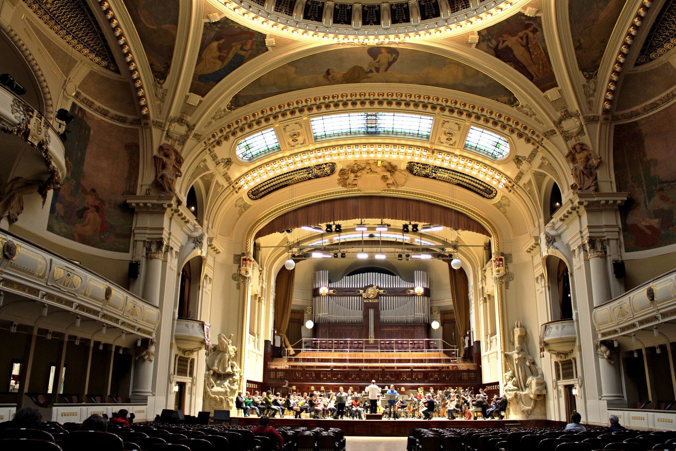 Interiér Smetanovy síně Obecního domu, Praha